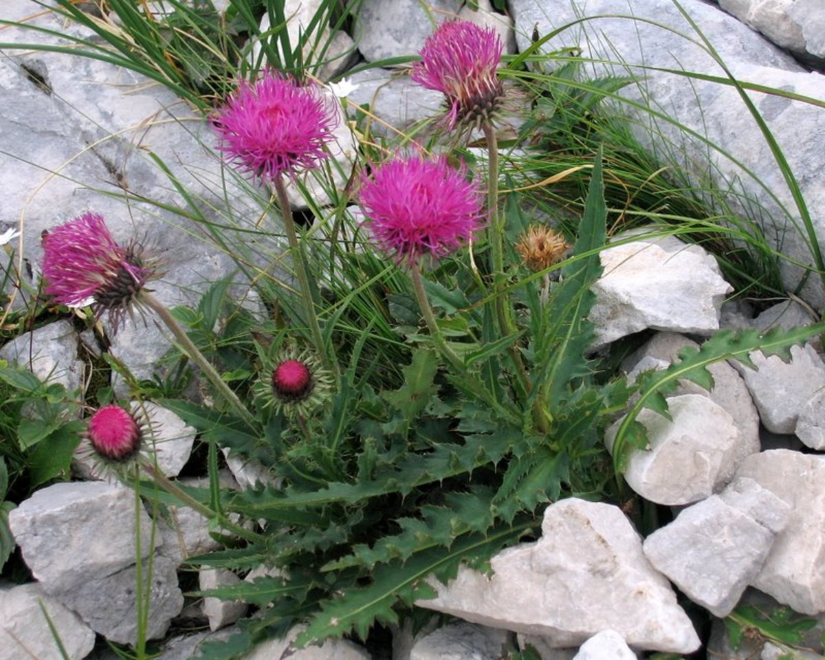 Alpski bodak na Mišelj vrhu.